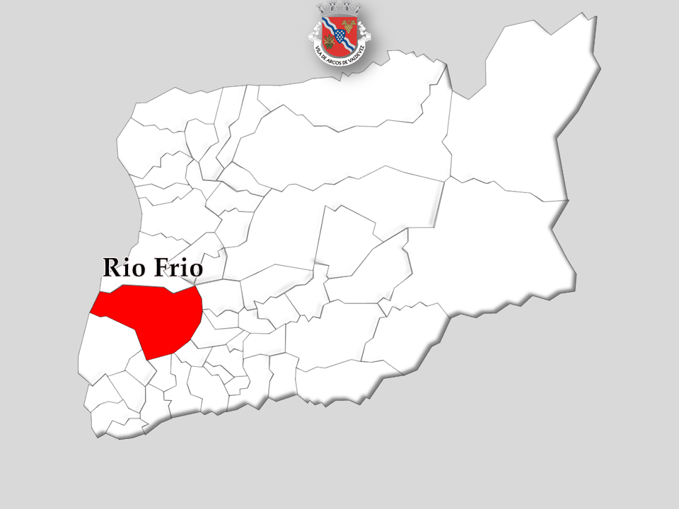 Censos 1864/2011